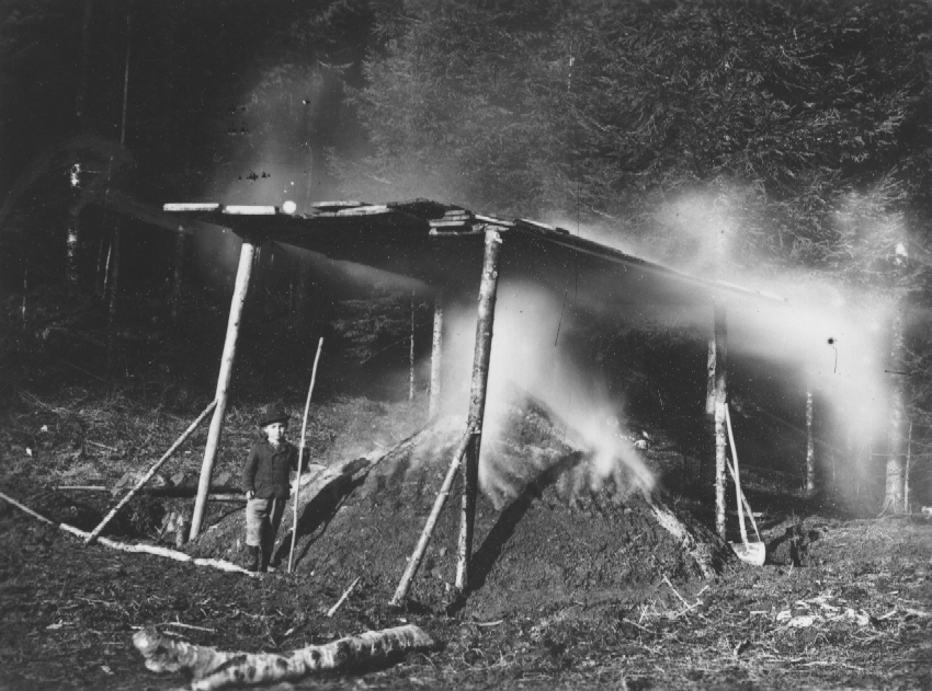 Oglarska kopa